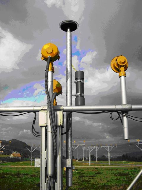 Inhibidor de llamps